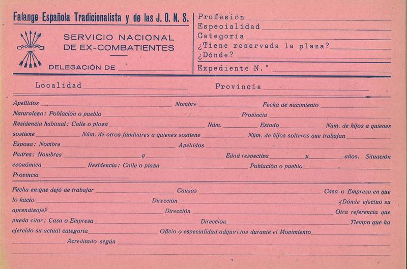 Ficha de Excombatientes de Falange en el Archivo Municipal de Pradejón.